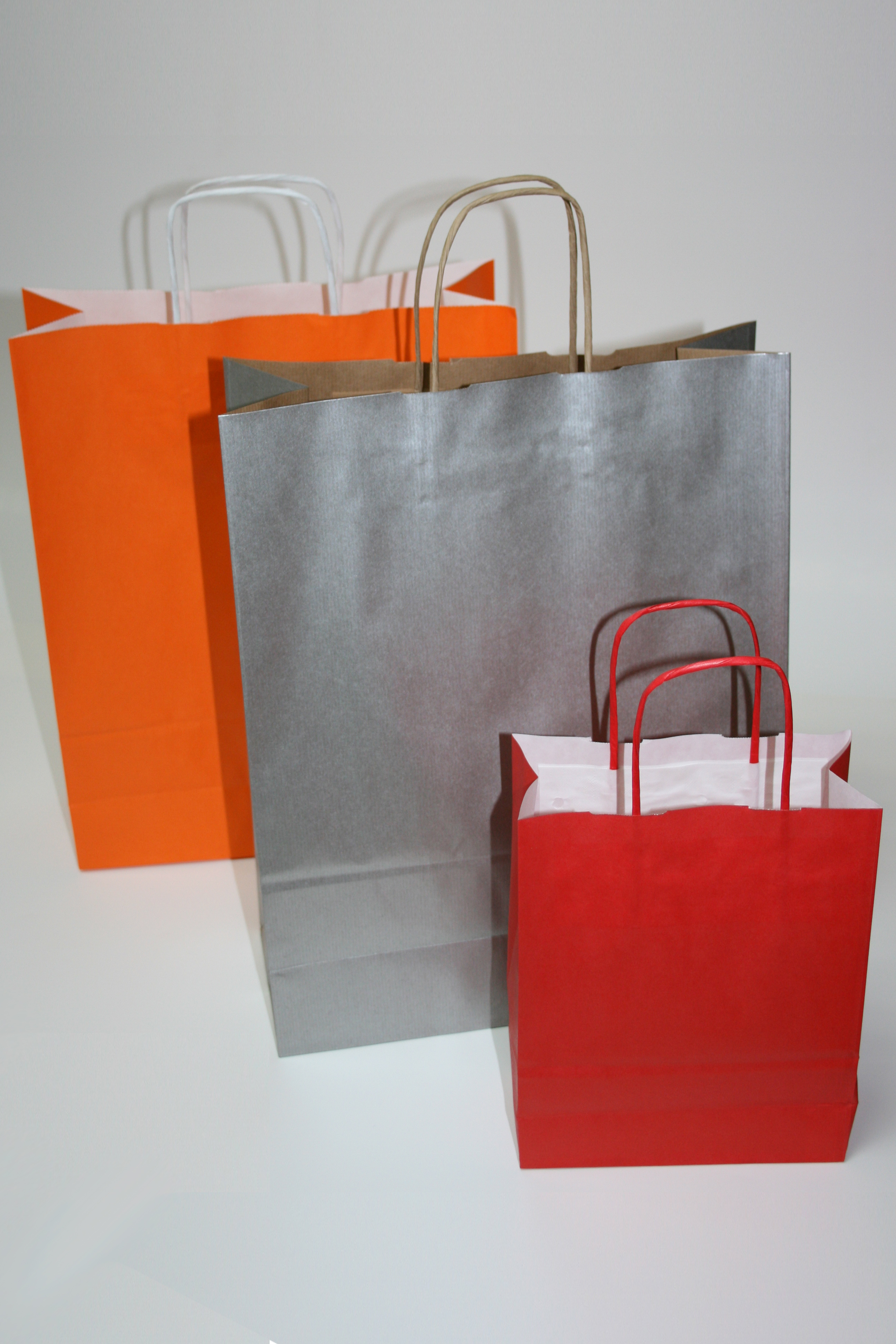 Bolsas de papel con asa rizada o retorcida